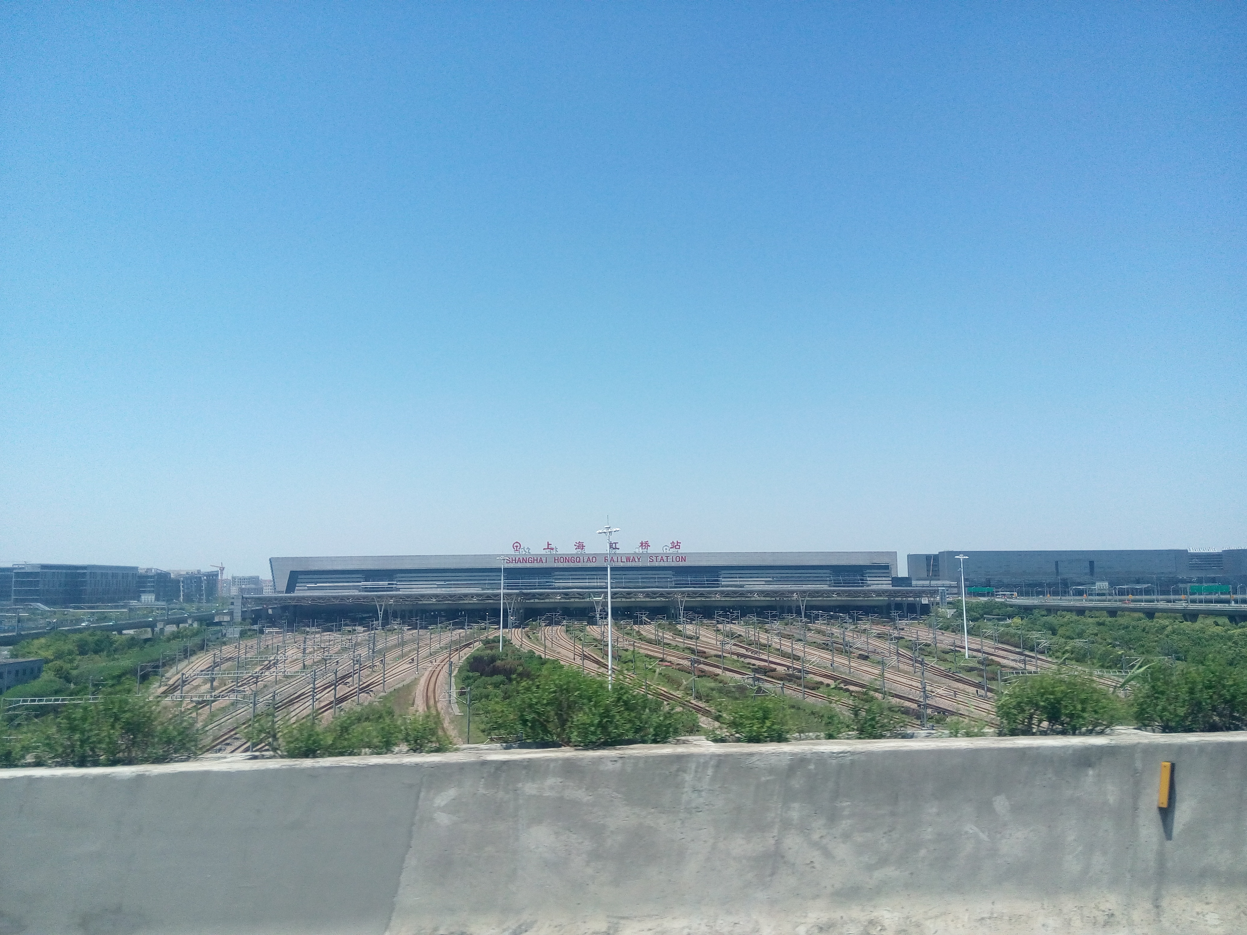 虹桥站南侧